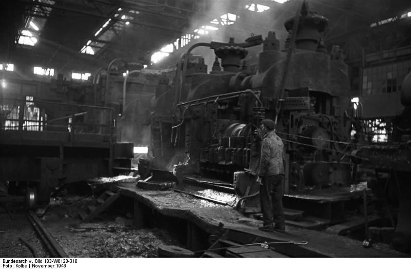 Unterwellenborn, Maxhütte ADN-ZB / Kolbe, Anlagen im Walzwerk der Maxhütte in Unterwellenborn.